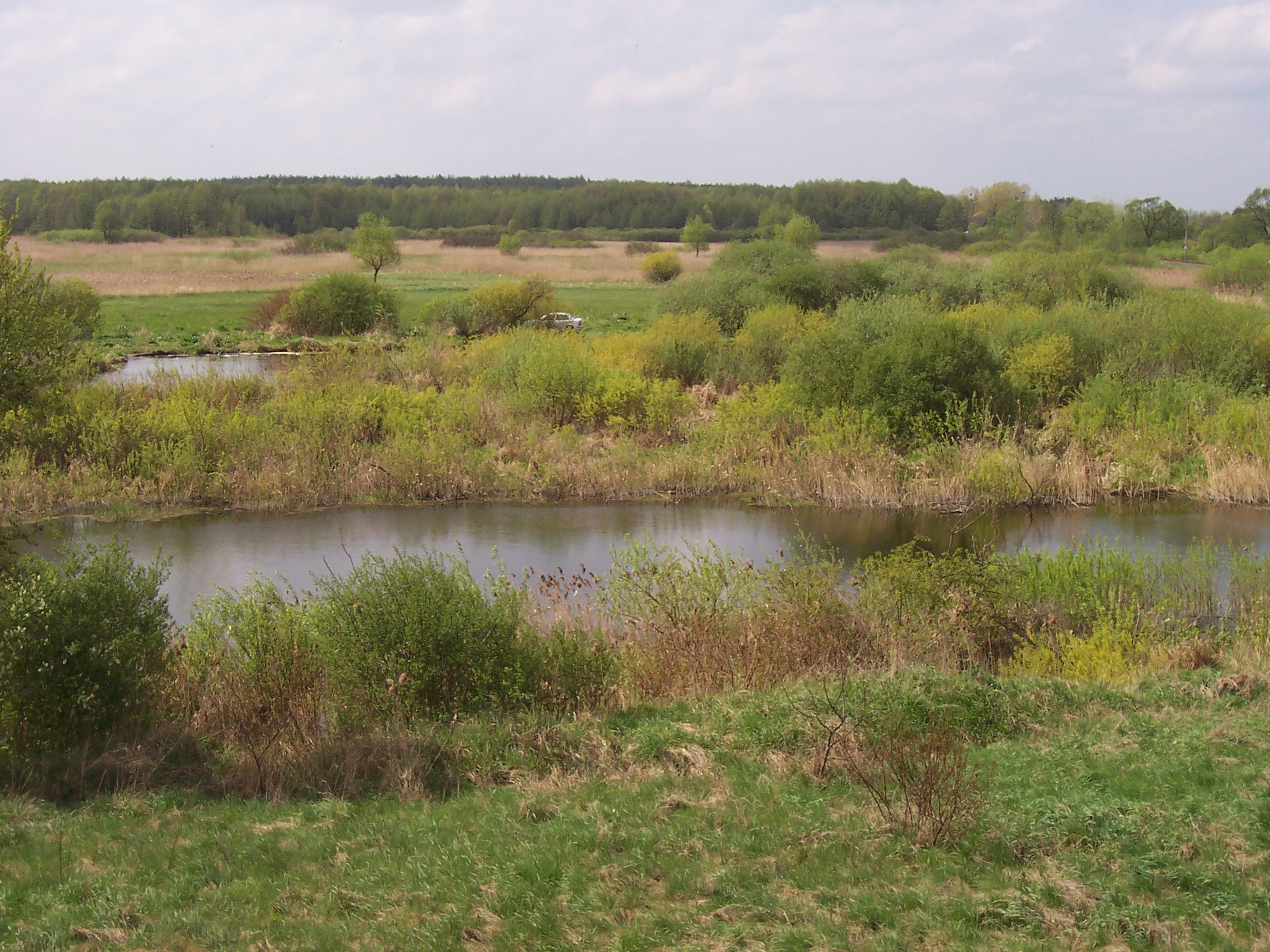 Беларуская (тарашкевіца): Бобра каля Асаўца.